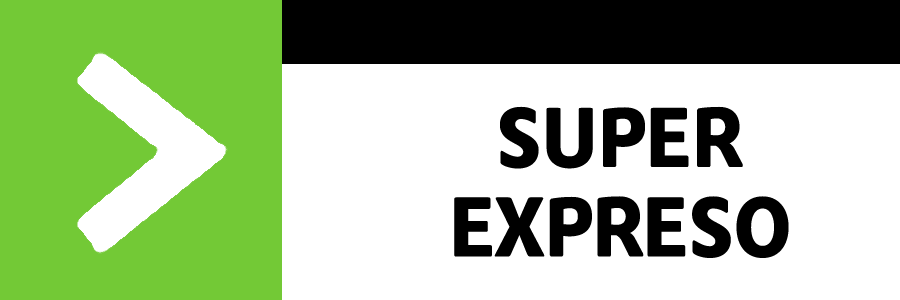 Señal super expreso transantiago (recreacion)